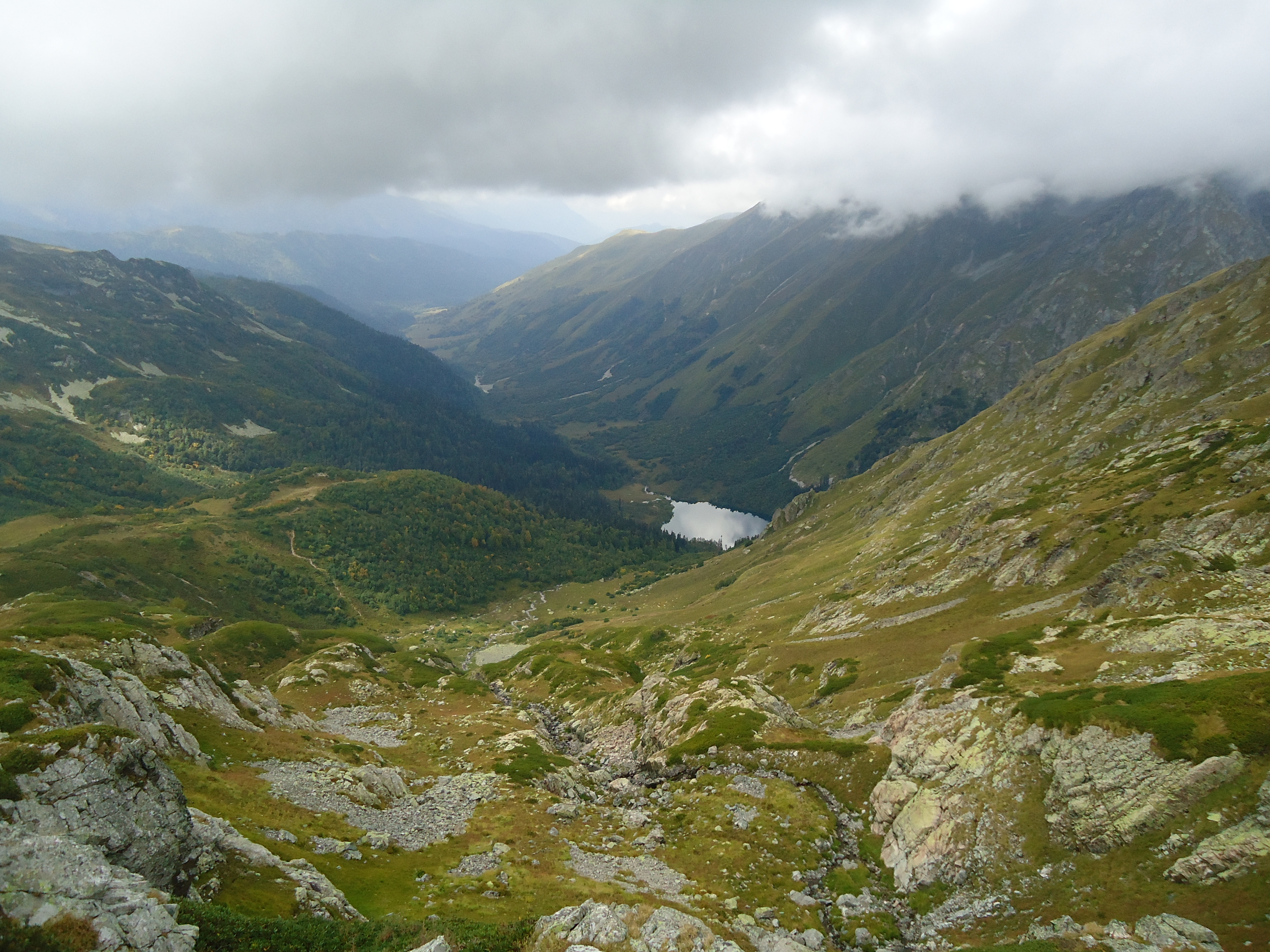 Озеро Кардывач и долина реки Мзымты, Территория Кавказского биосферного заповедника This image is related to the protected area of Russia number 2320405